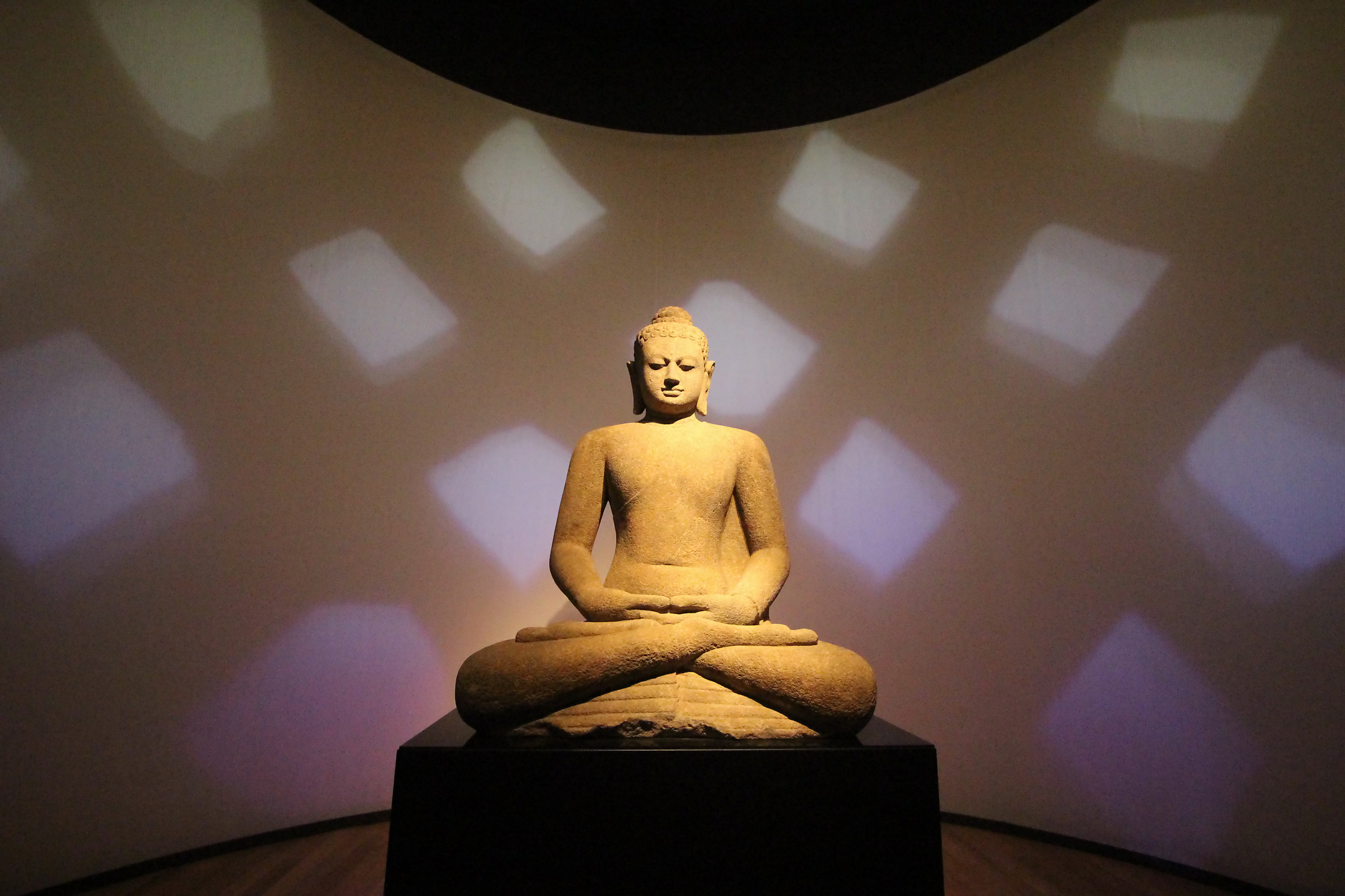 world museum rotterdam in 2014 (52)